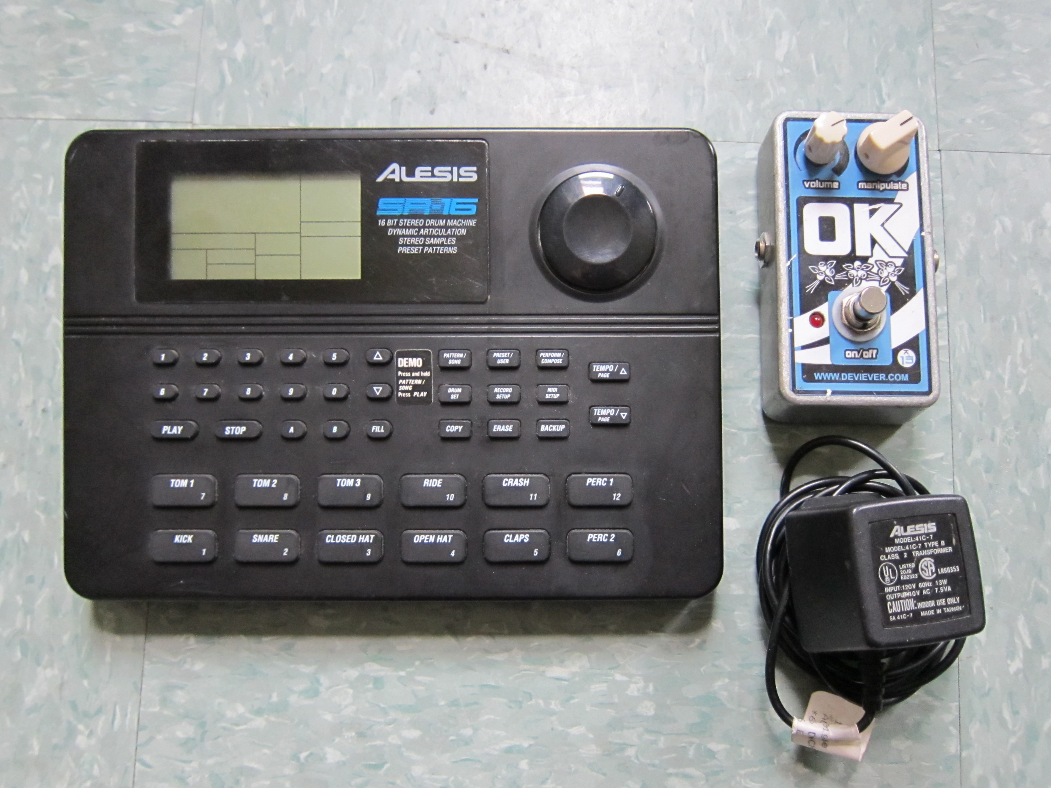 Alesis SR-16 Drum Machine] Devi Ever OK Lo-Fi Fuzz with Stuttering Decay